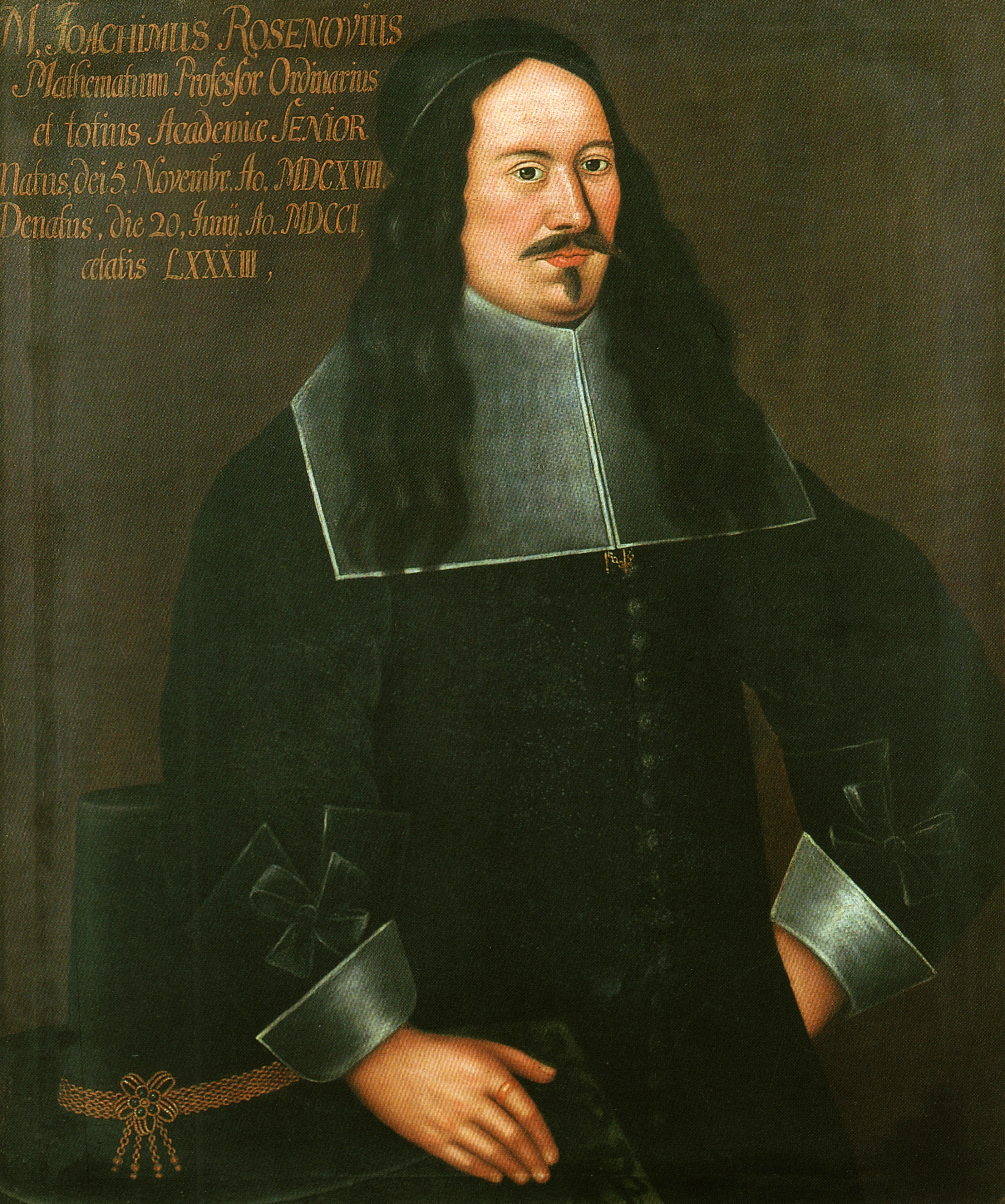 Ölgemälde von Joachim Rosenow